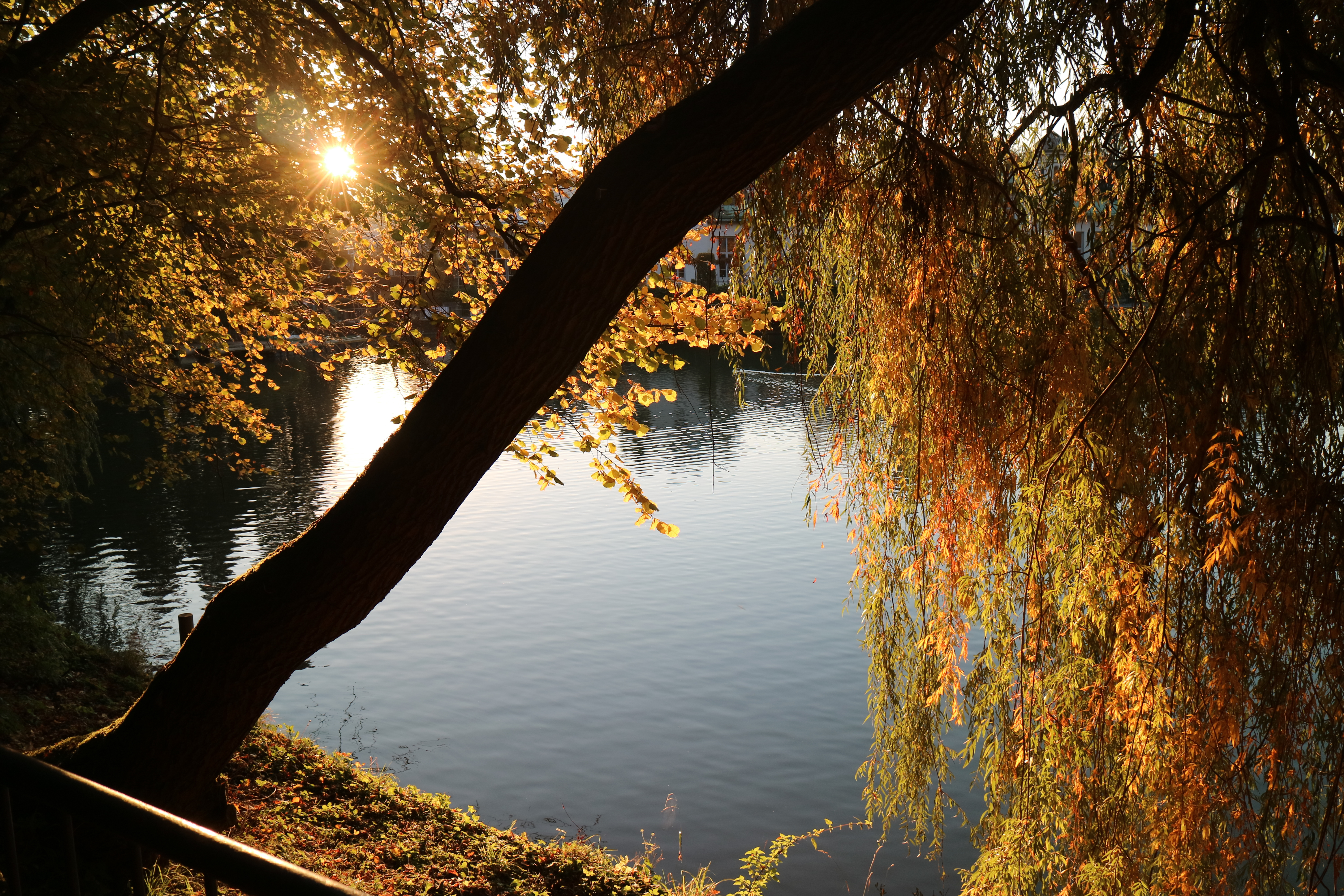 Sonnenuntergang am Hilmteich in Graz